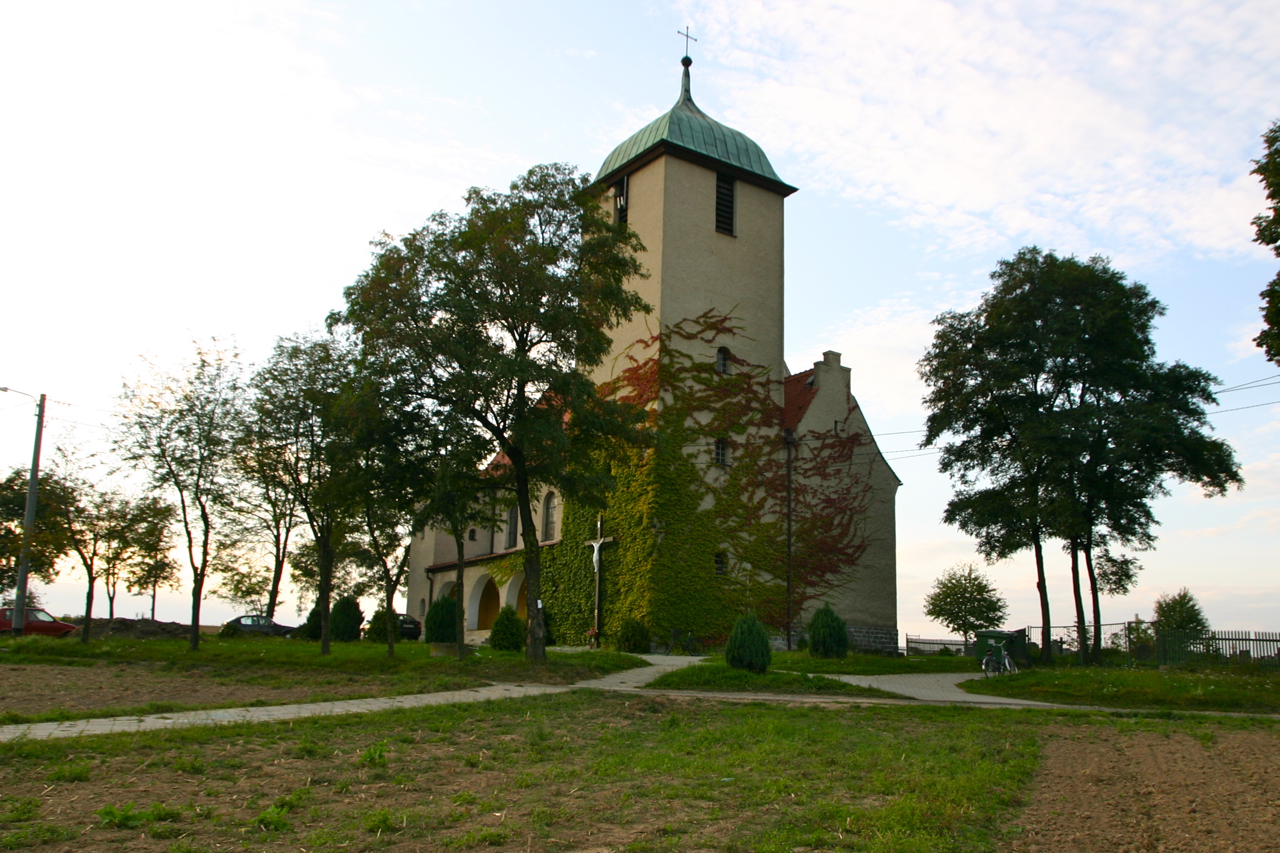 Czyżowice – wieś w Polsce położona w województwie opolskim, w powiecie prudnickim, w gminie Prudnik.